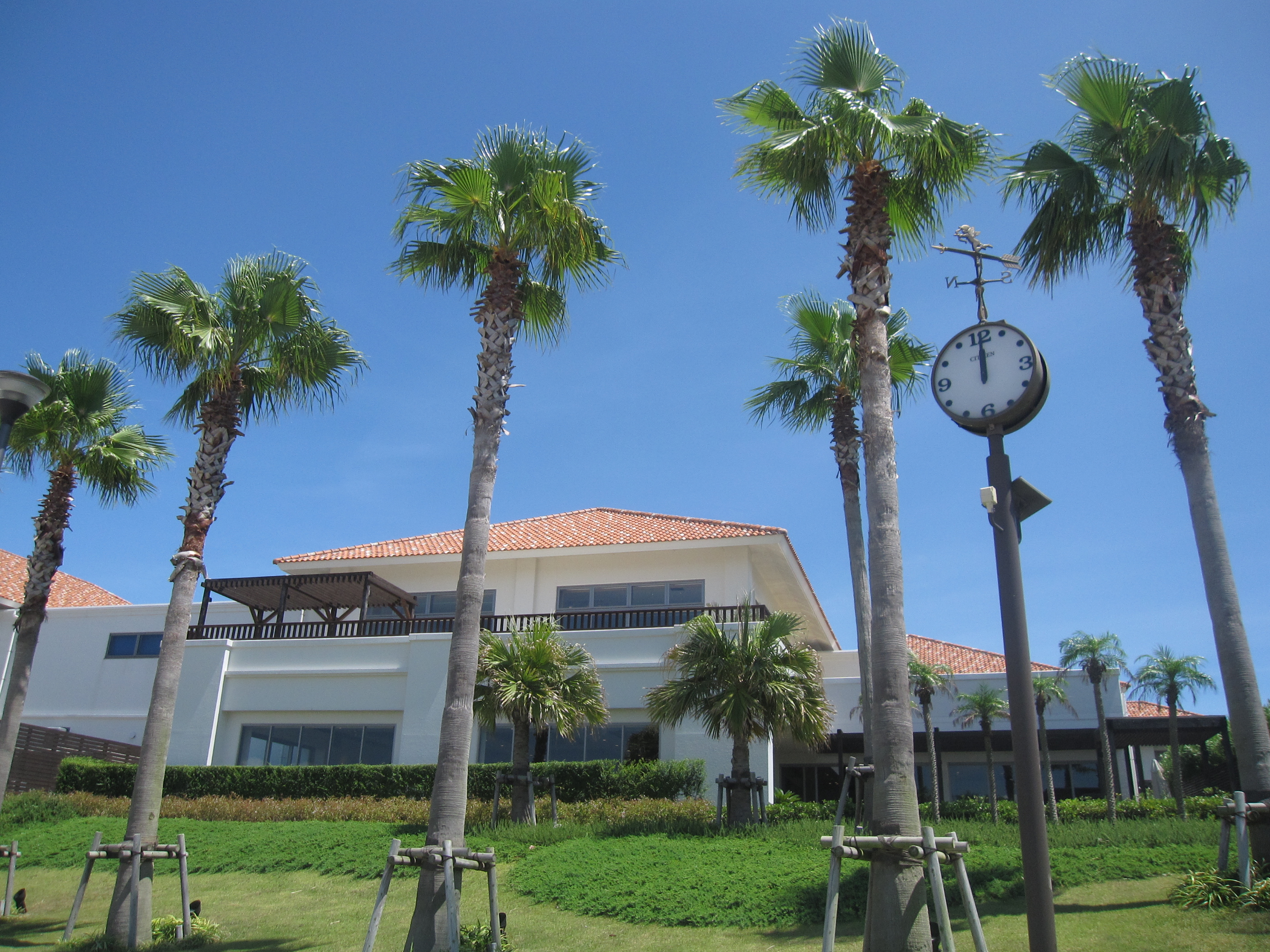 ラヴィマーナ神戸 RAVIMANA KOBE